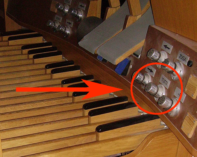 pédalier d'orgue avec le piston de tutti mis en évidence par infographie